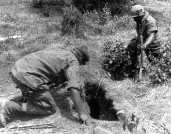 Tunnelrat preparing for entering vietnamese Tunnel, Vietnam, unknown date